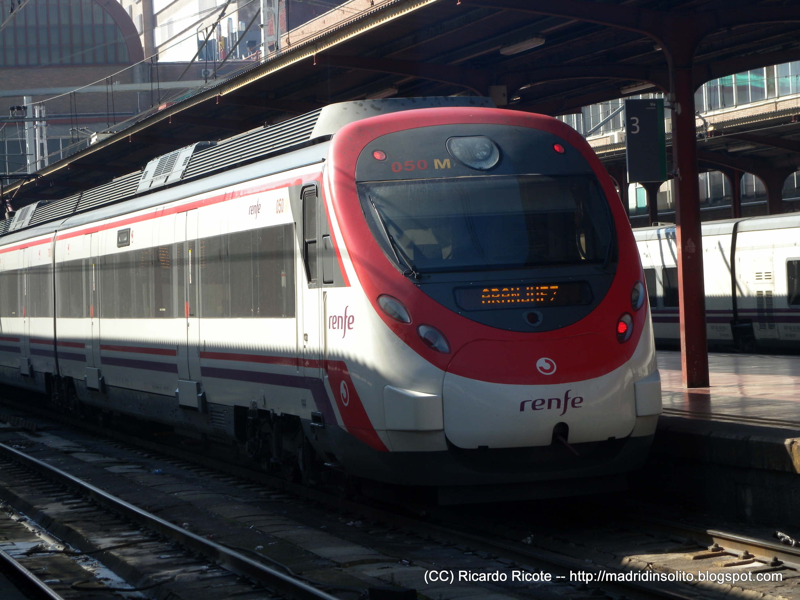 UT465 Renfe Cercanías Civia II